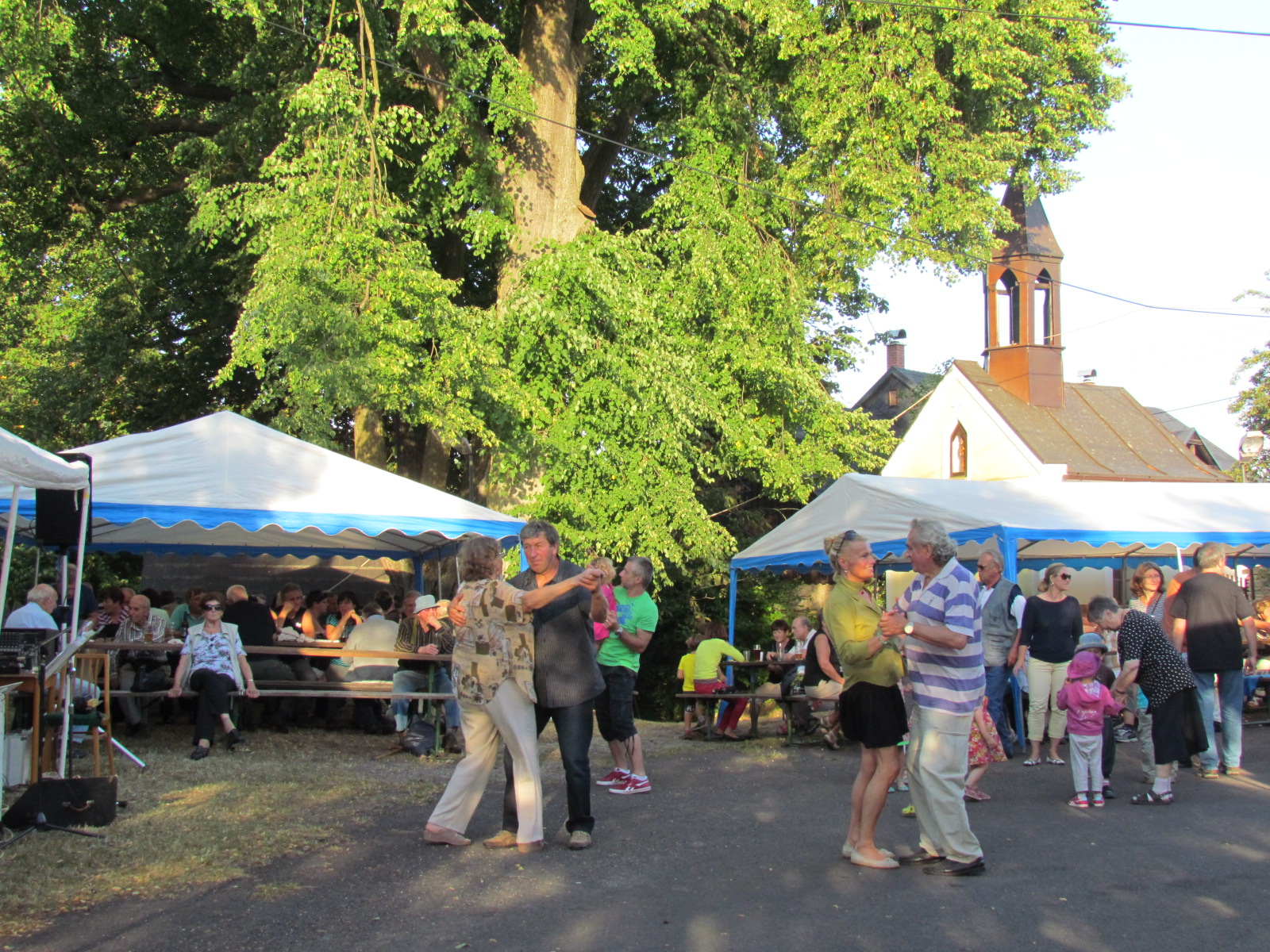 Padařovice - kaple sv. Jana Nepomuckého se skupinou památných lip při letním koncertu Pod lipami